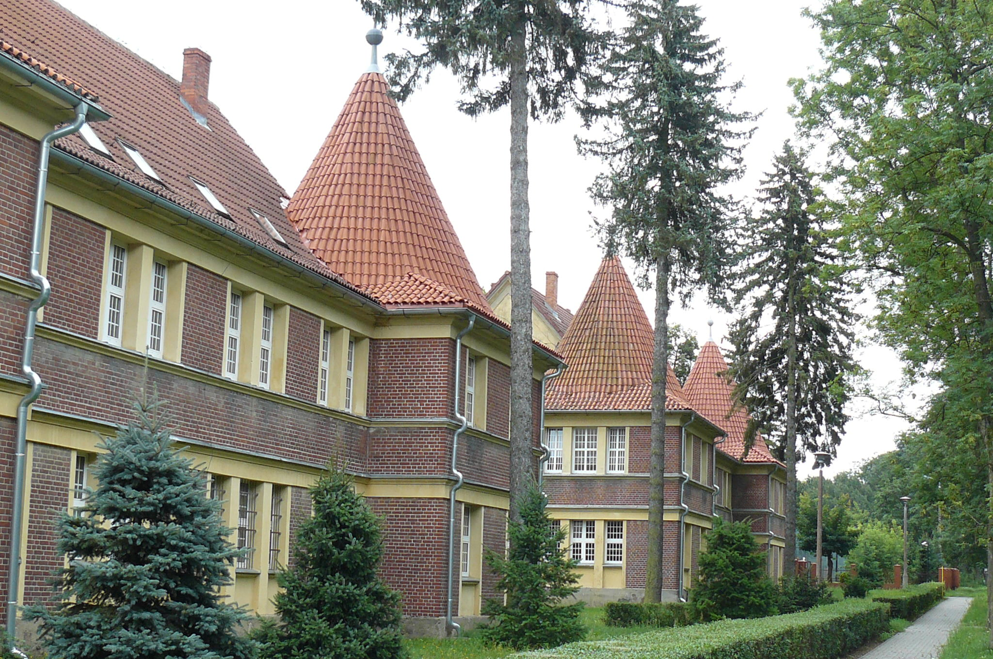 Młodzieżowy Ośrodek Wychowawczy im. Janusza Korczaka w Antoniewie (1914r., brama z 1938r.).